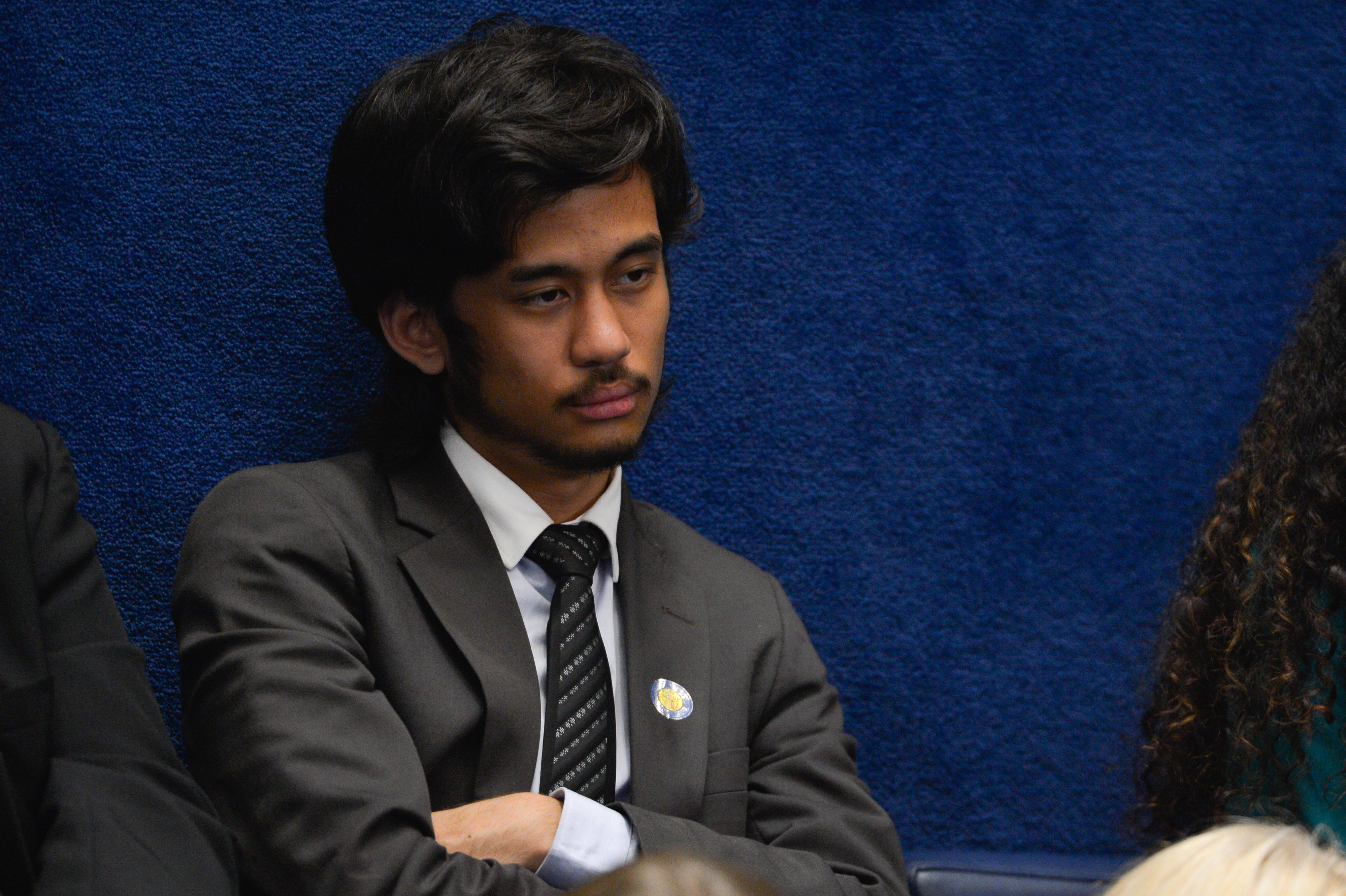 Brasília - O líder do Movimento Brasil Livre, Kim Kataguirii, durante a defesa da presidenta afastada Dilma Rousseff em sessão de julgamento do impeachment, no Senado (Fabio Rodrigues Pozzebom/Agência Brasil)